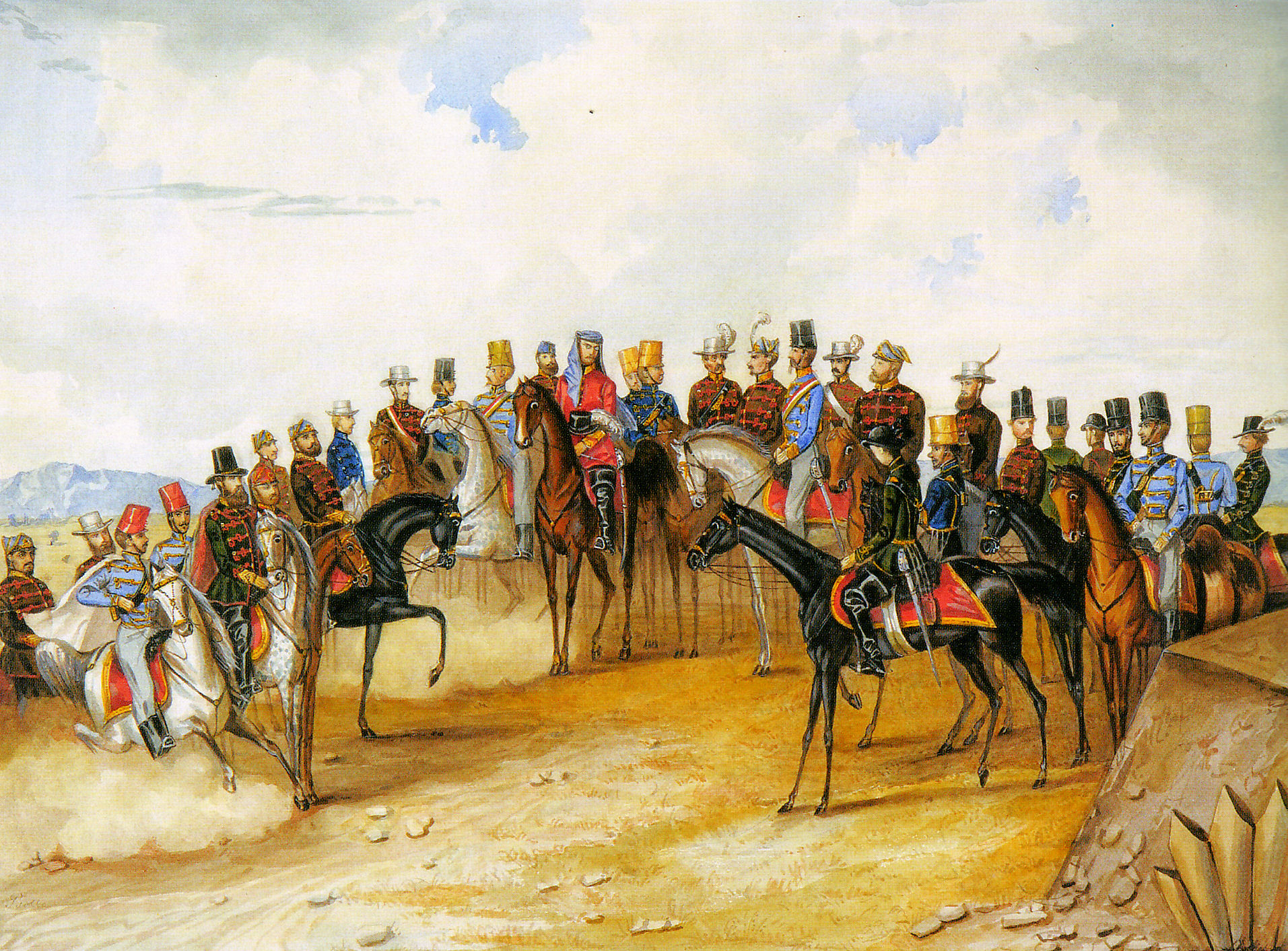 Görgei Artúr altábornagy és hadseregének tisztikara. Than Mór vízfestménye